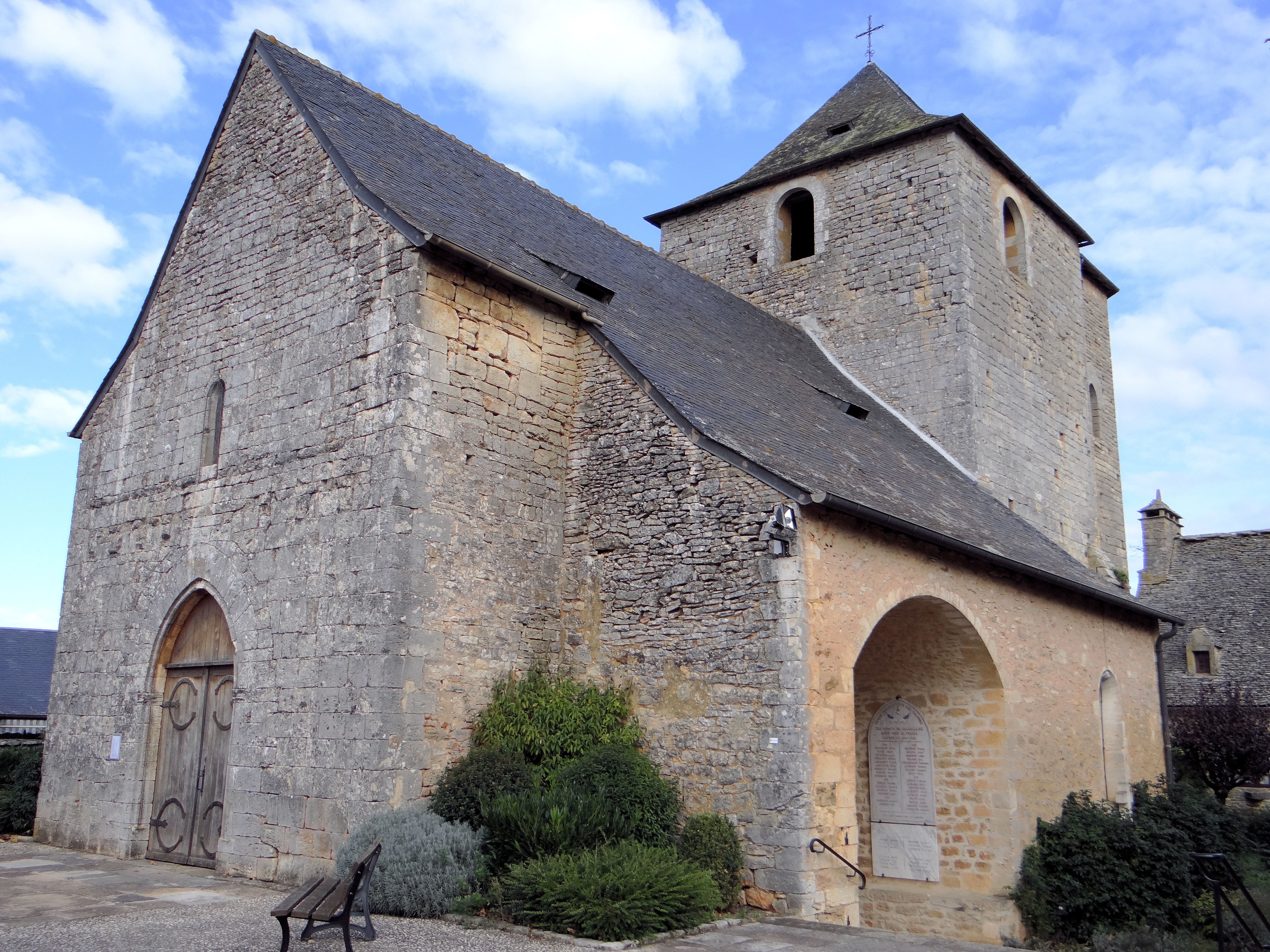 Nadaillac - Église Saint-Denis